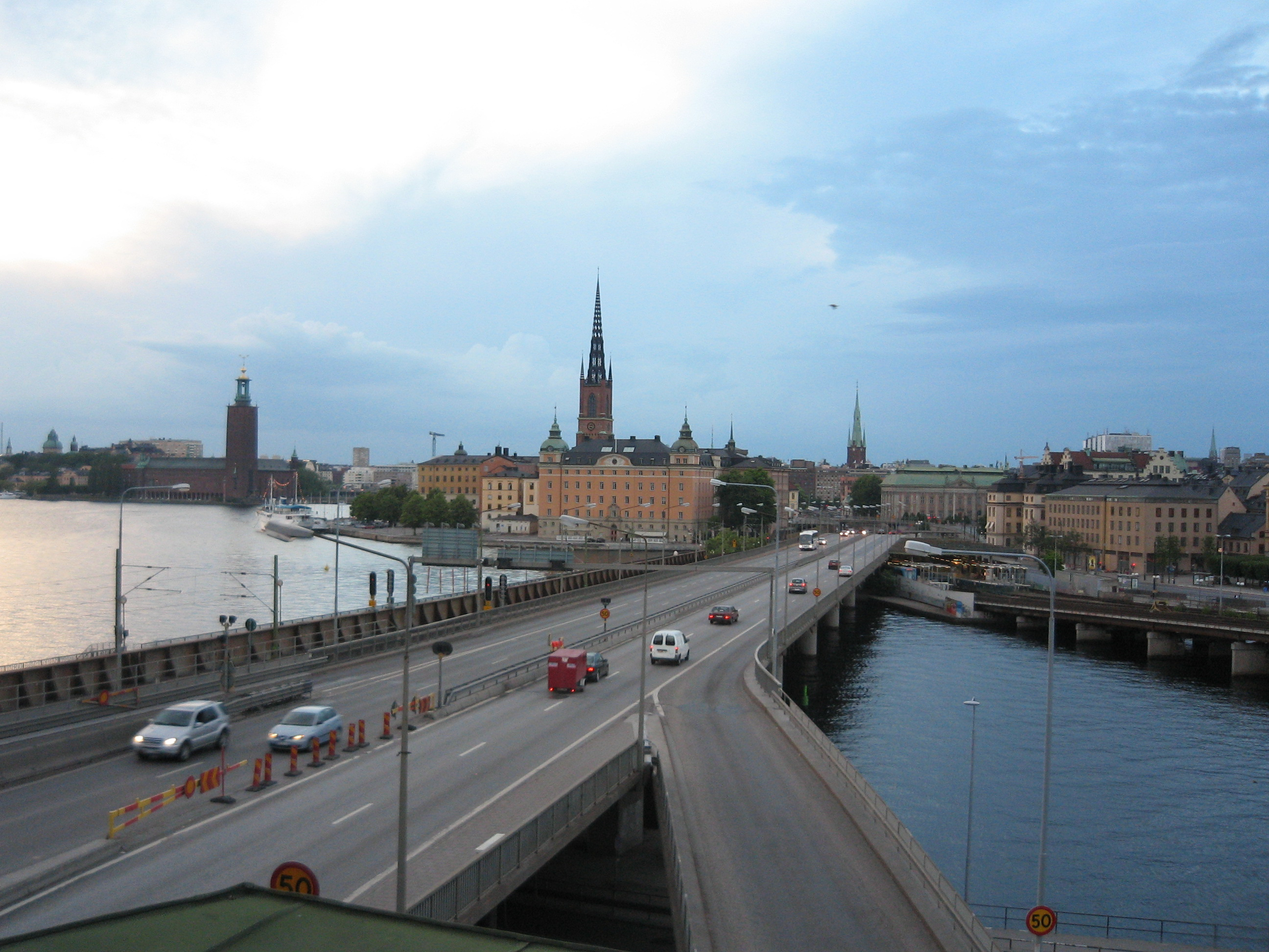 Vy över Stockholm